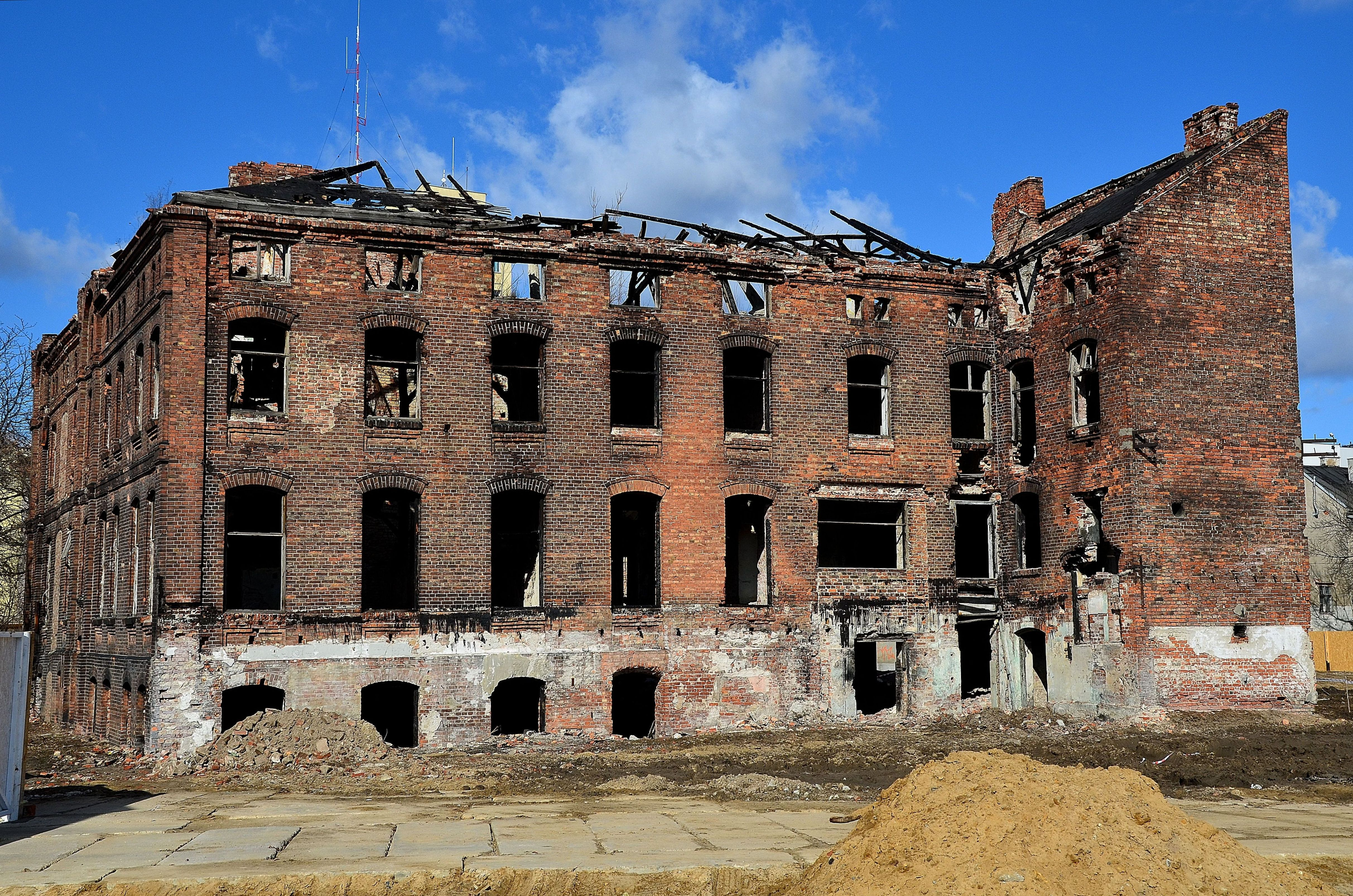 Fabryka Ślusarska Ogórkiewicza i Zagórnego w Warszawie